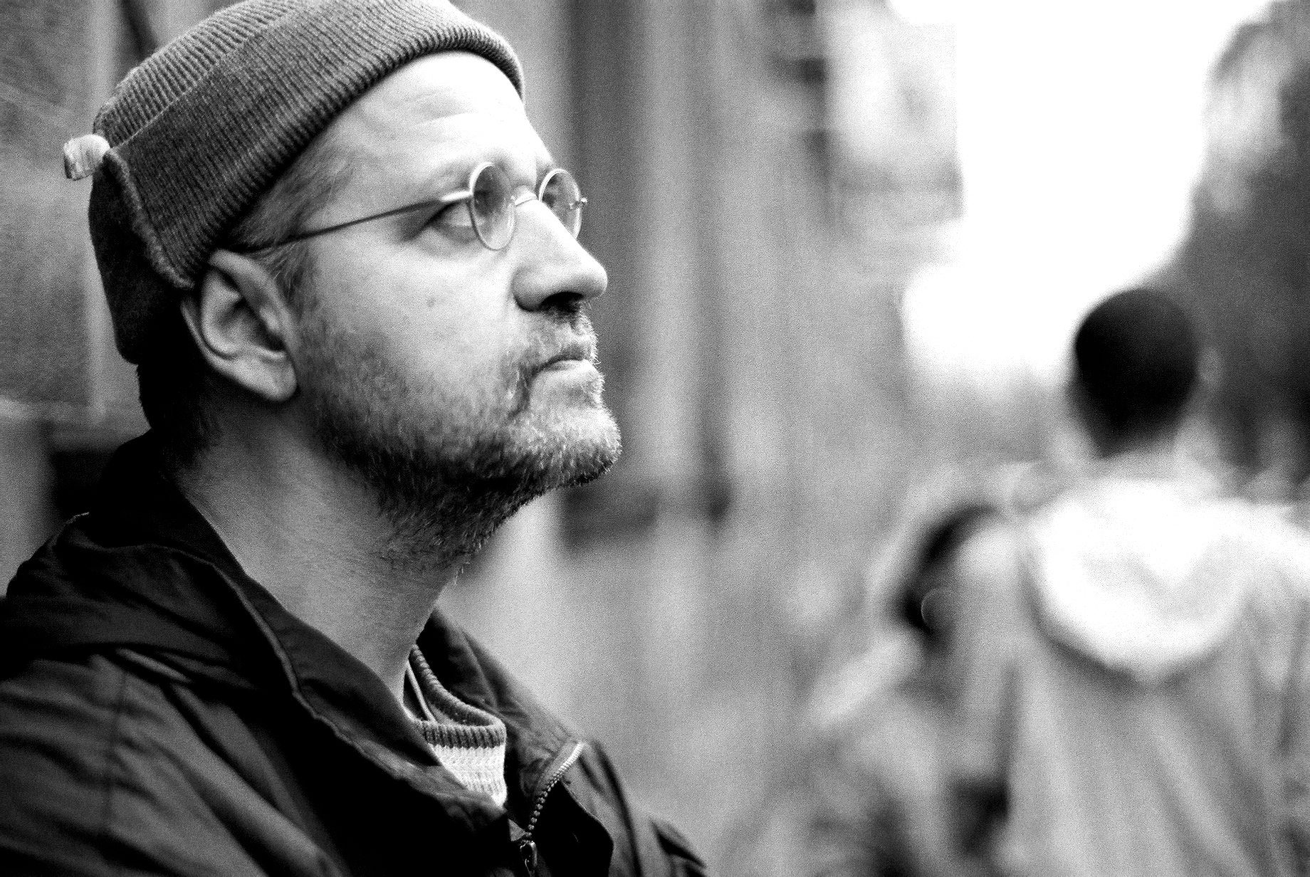 Georges Federmann, rue Lauth à Strasbourg, Octobre 2002. (photographié par son fils David Federmann)